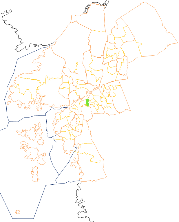 Karta som visar primärområdes belägenhet i Göteborg